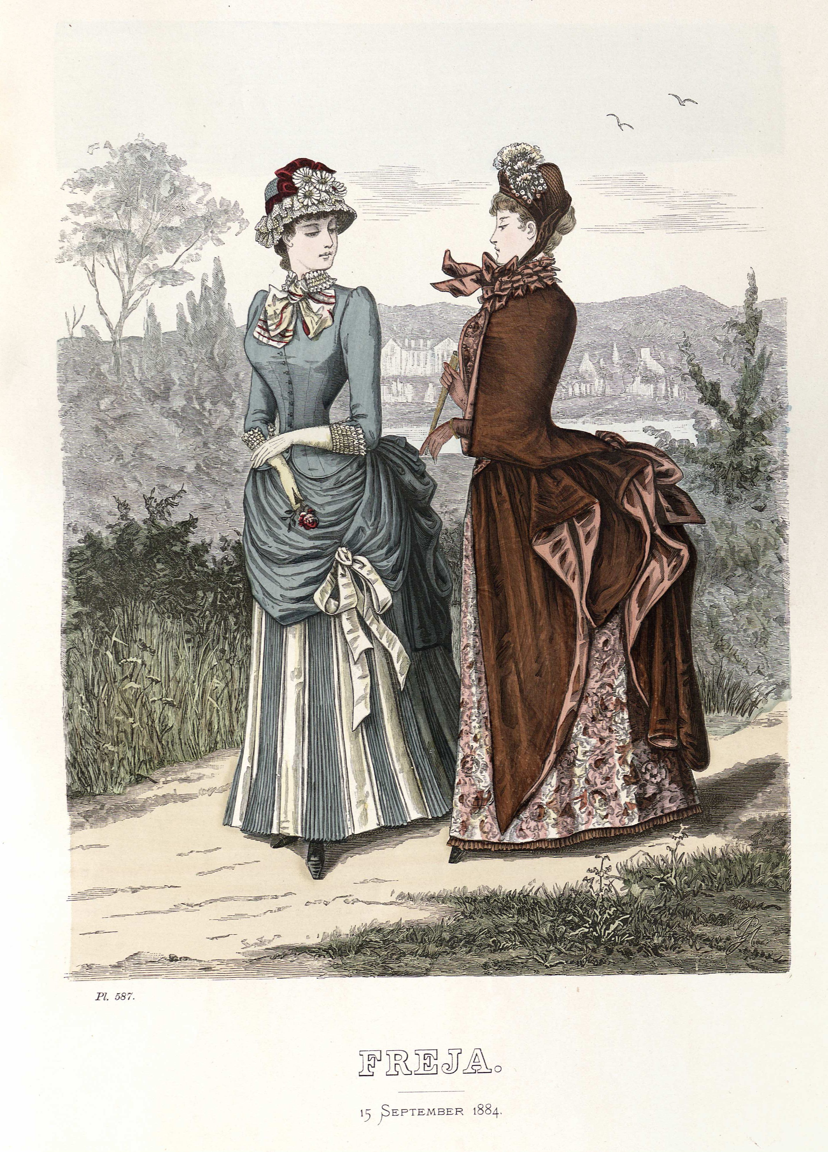 Klänning; Band; Hatt; Blommor; Spets; Mantilj; Solfjäder